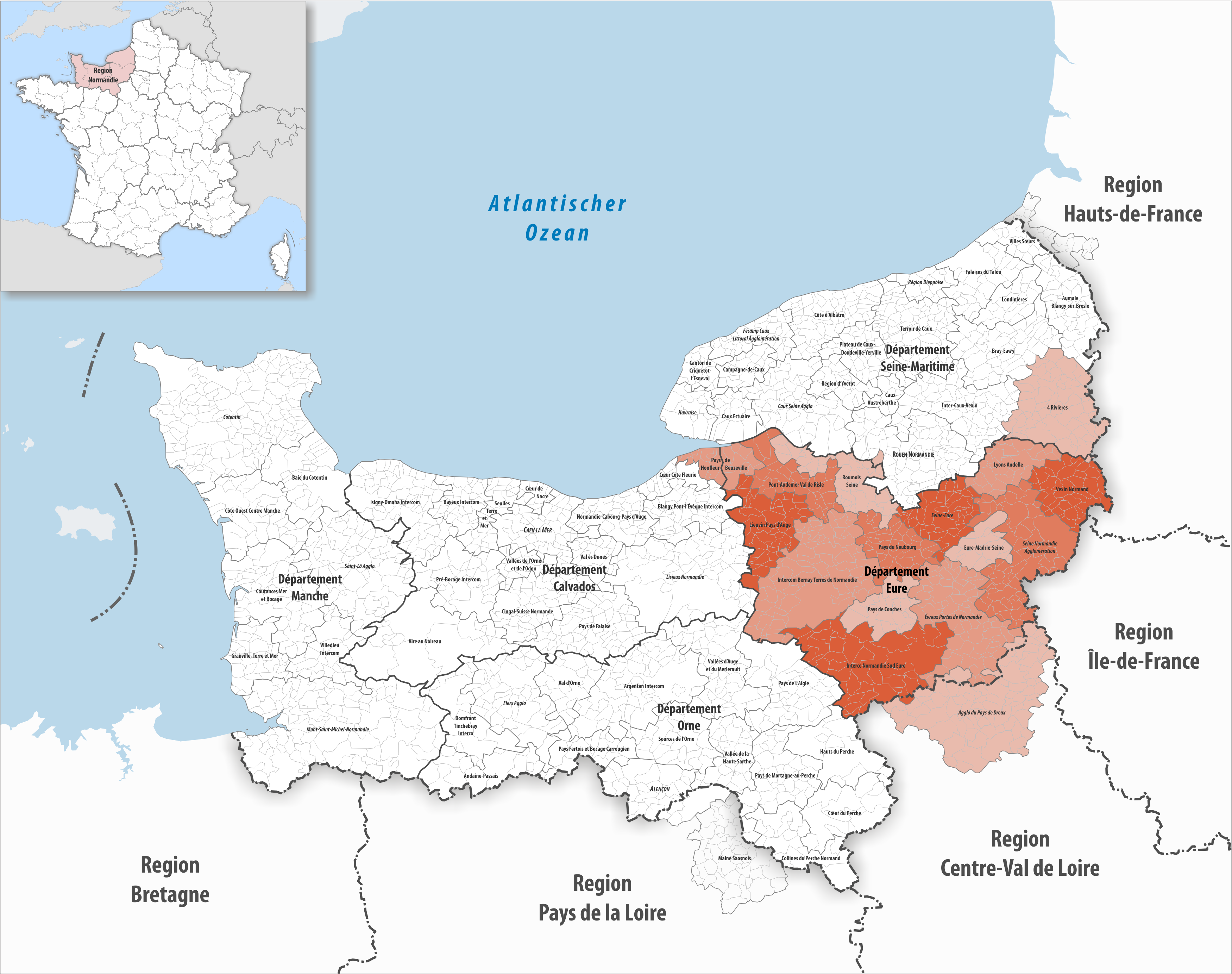 Gemeindeverbände im Département Eure